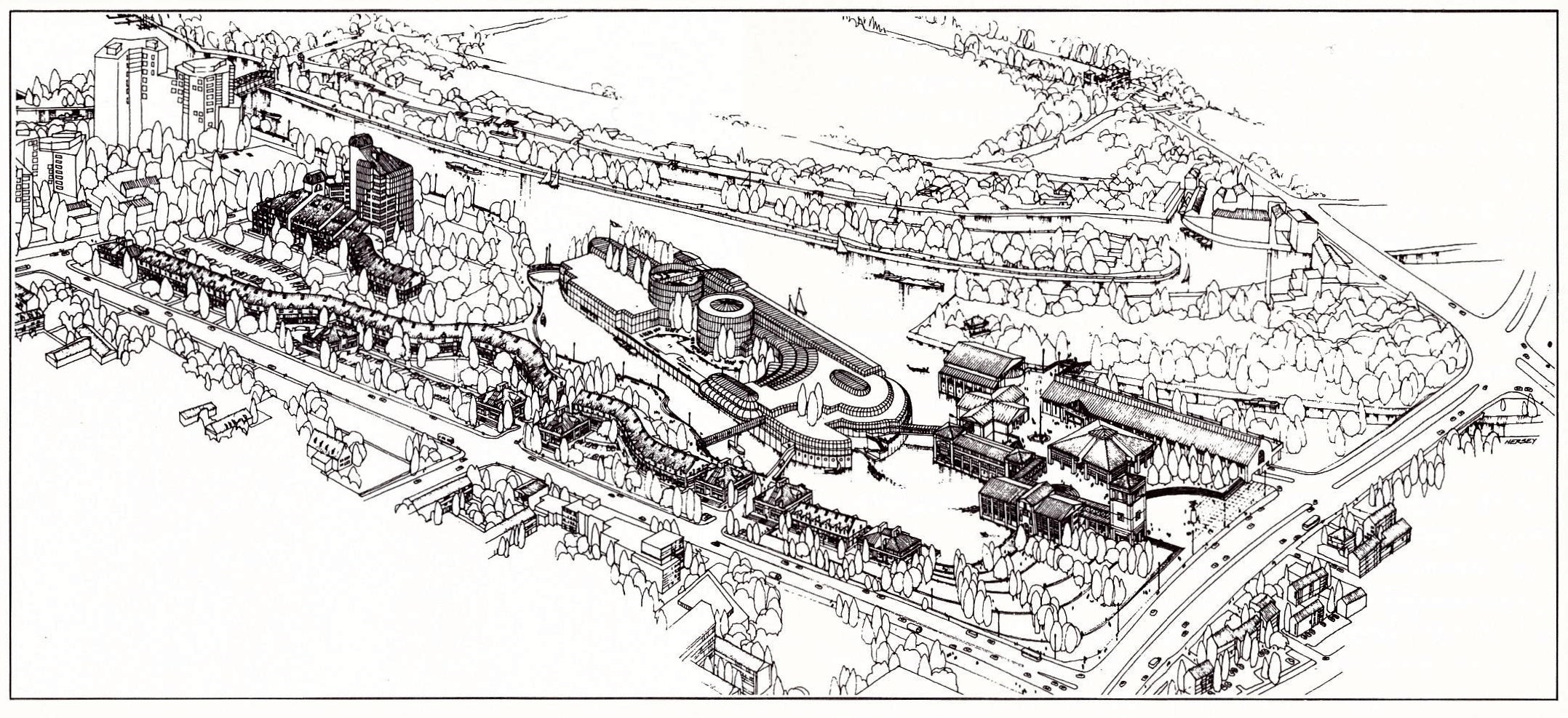 Tegeler Kultur- und Freizeitzentrum - IBA-Wettbewerbsentwurf